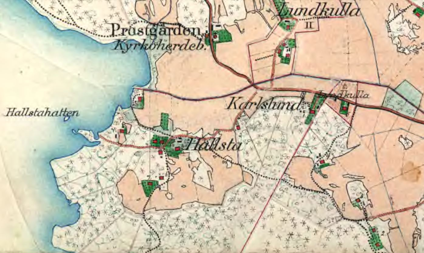 Del av häradsekonomiska kartan över Hallsta, Adelsön